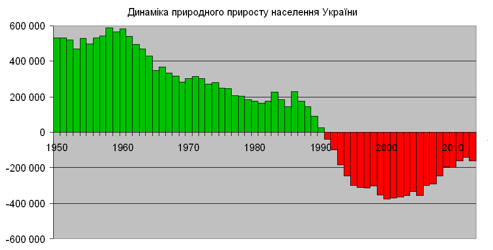 Natural population growth in Ukraine, 1950-2013